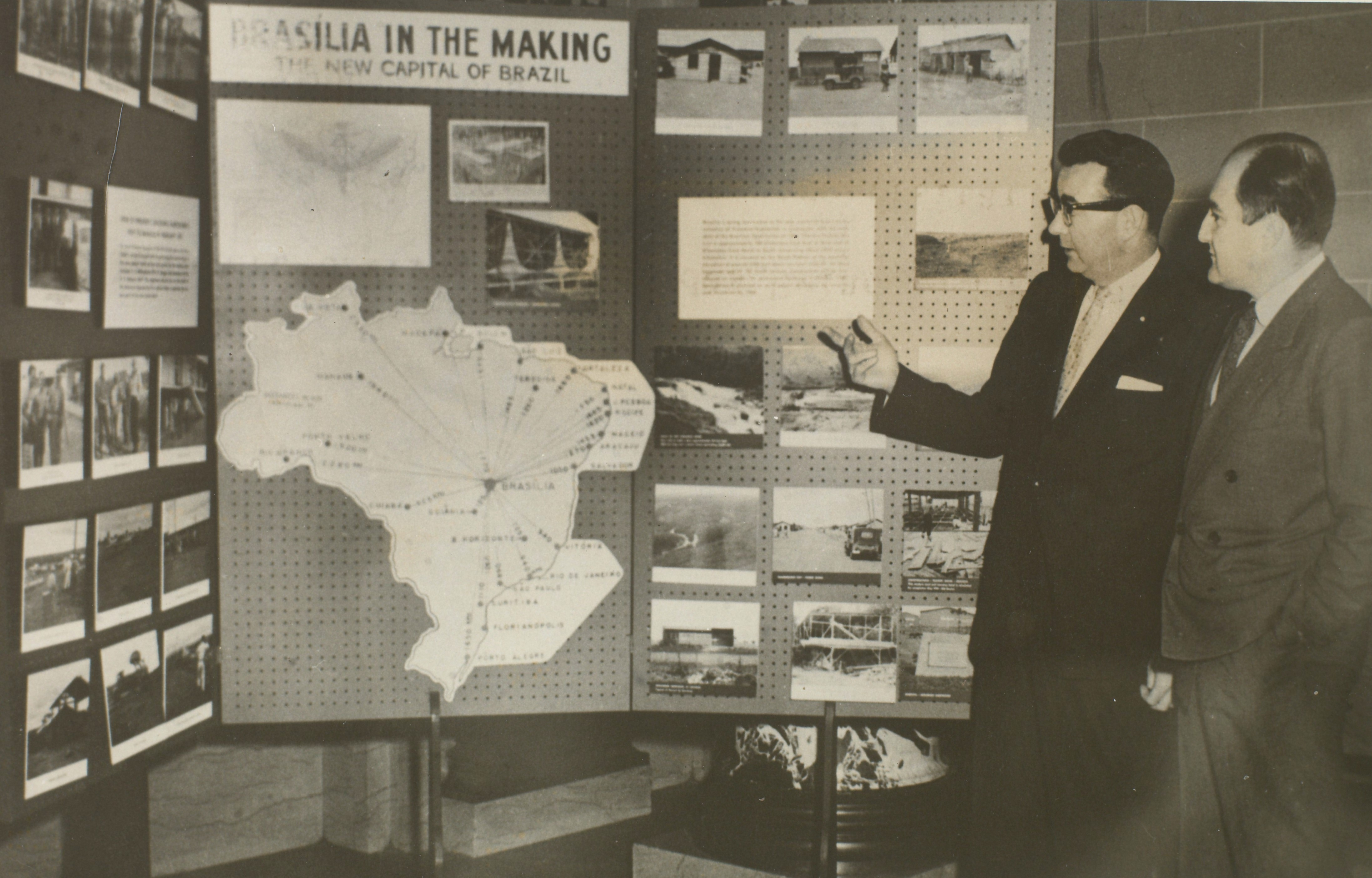 Fotografia do Fundo Correio da Manhã, sob a guarda do Arquivo Nacional.